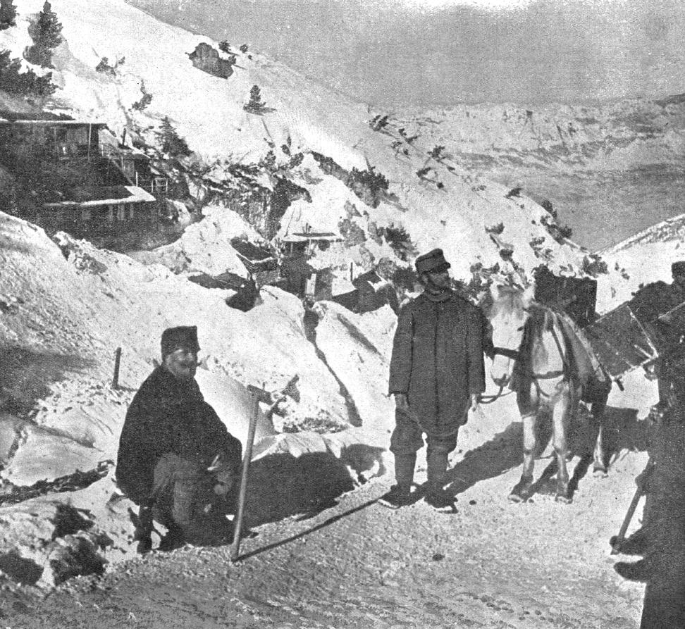 Barake avstroogrske vojske na tirolski fronti